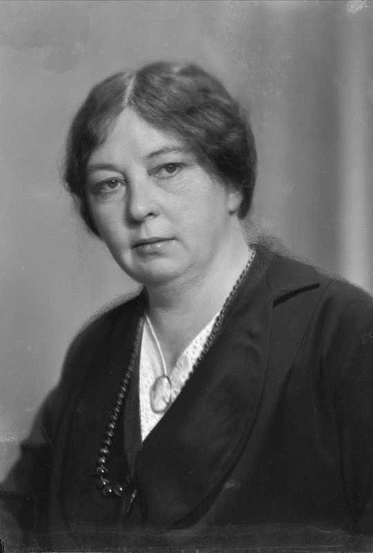 Sigrid Undset, portrett, kvinne, forfatterinne, brystbilde.